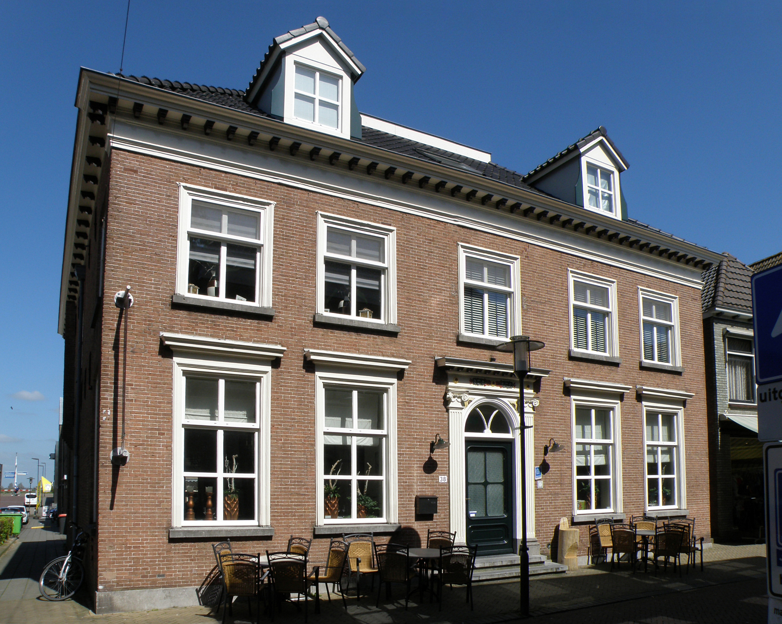 Werkendam, Nederland. Notarishuis aan de Hoogstraat.